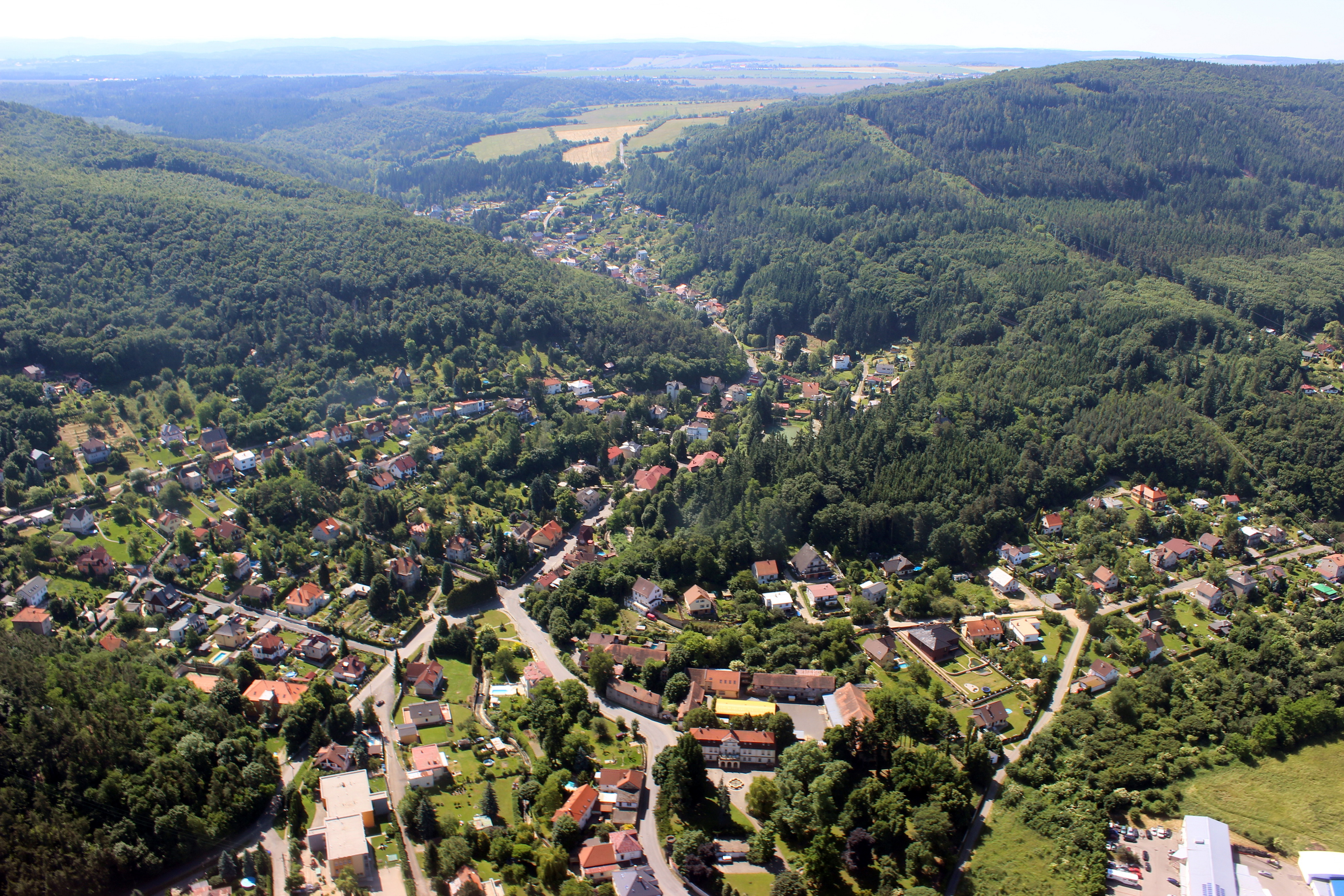 Letecký pohled na Všenory